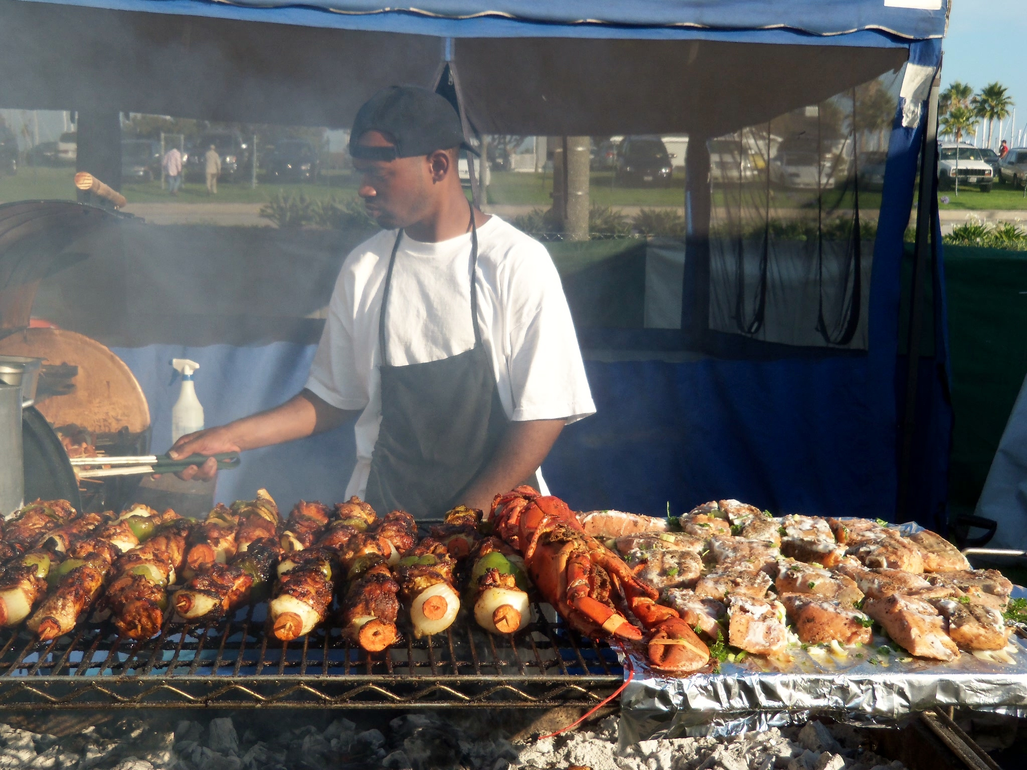 Chicken Kabob